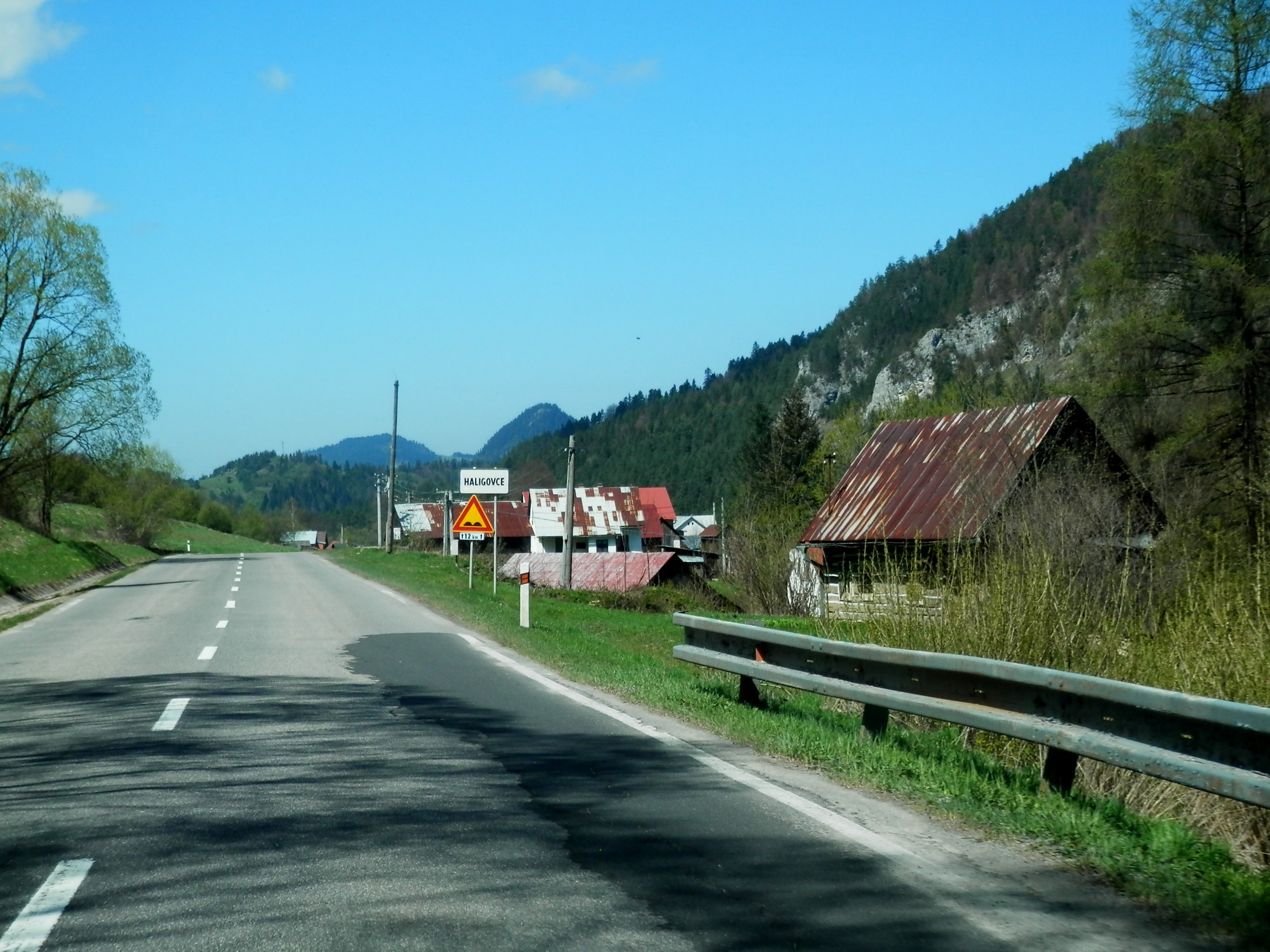 Spišská obec Haligovce, okres Stará Ľubovňa. Slovensko.